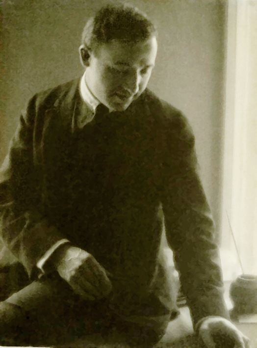 Max Weber